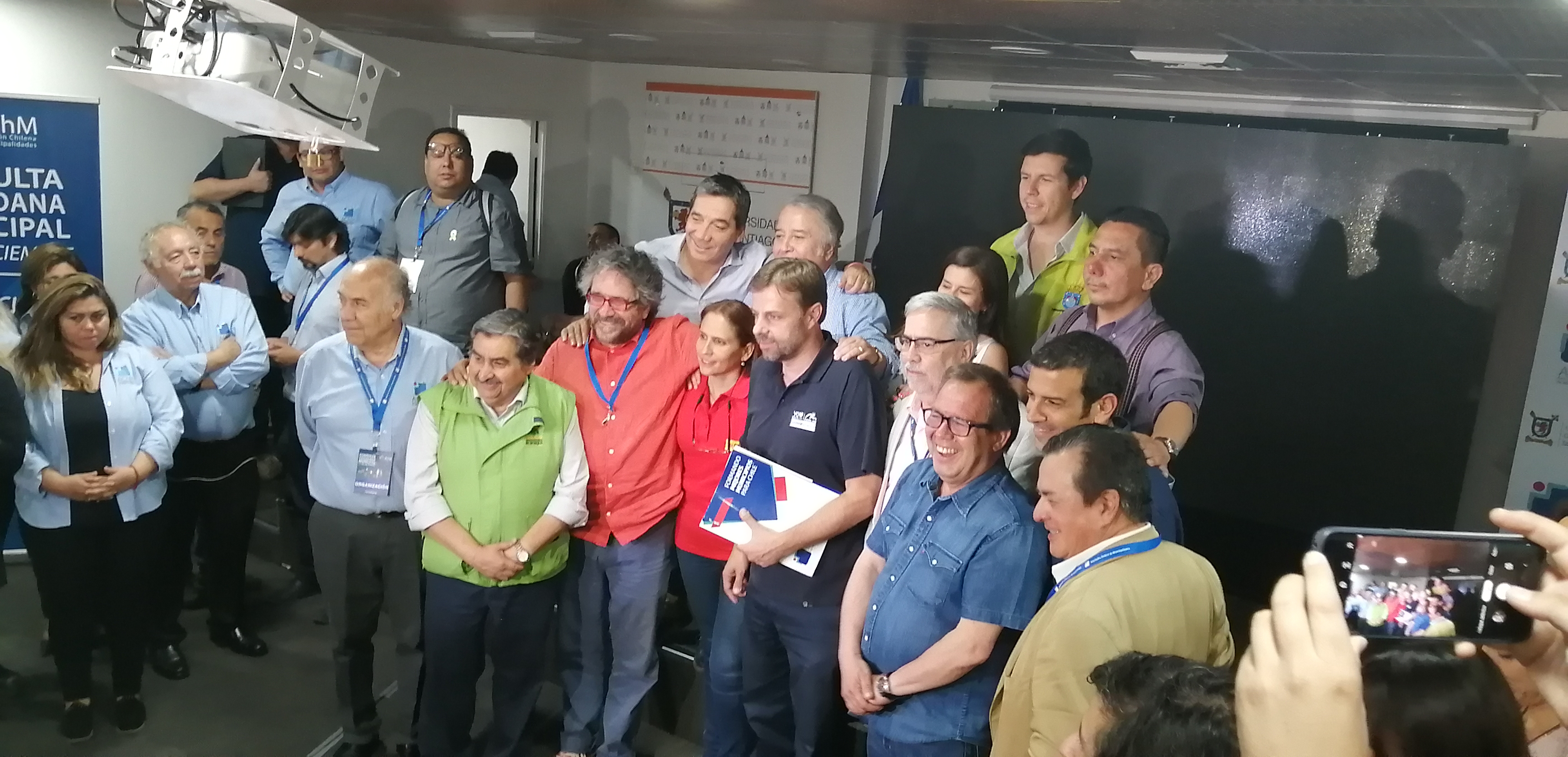 Desarrollo de la jornada dentro del Centro de Computos de la consulta ciudadana en las instalaciones de la Universidad de Santiago. En la imagen se aprecia un punto de prensa con la llegada de alcaldes miembros de la ACHM.